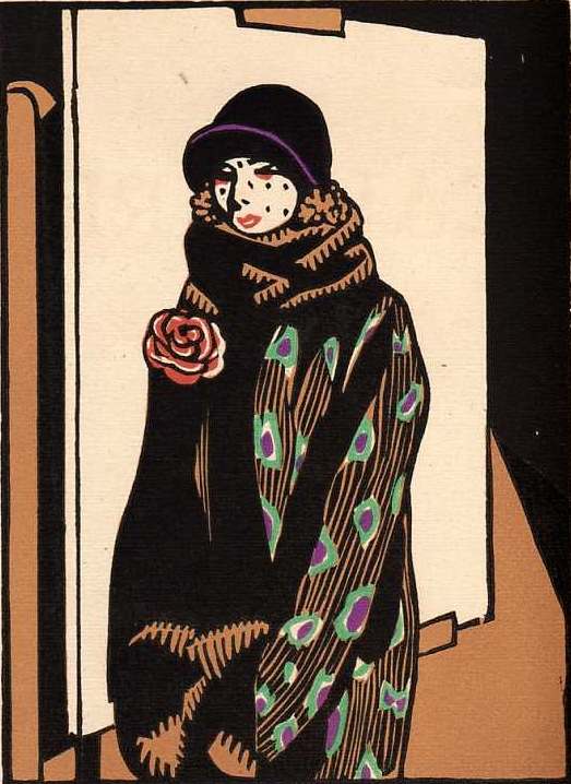 Illustration d'Hermann-Paul (1864-1940) pour le roman "Le Calvaire" d'Octave Mirbeau (1848-1917). Éditions Mornay, collection « Les Beaux Livres », n° 41, 1928.